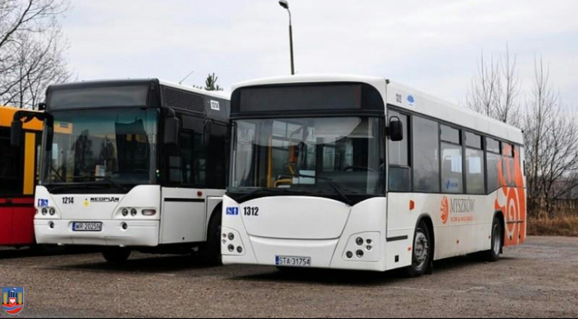 Autobusy w Myszkowie